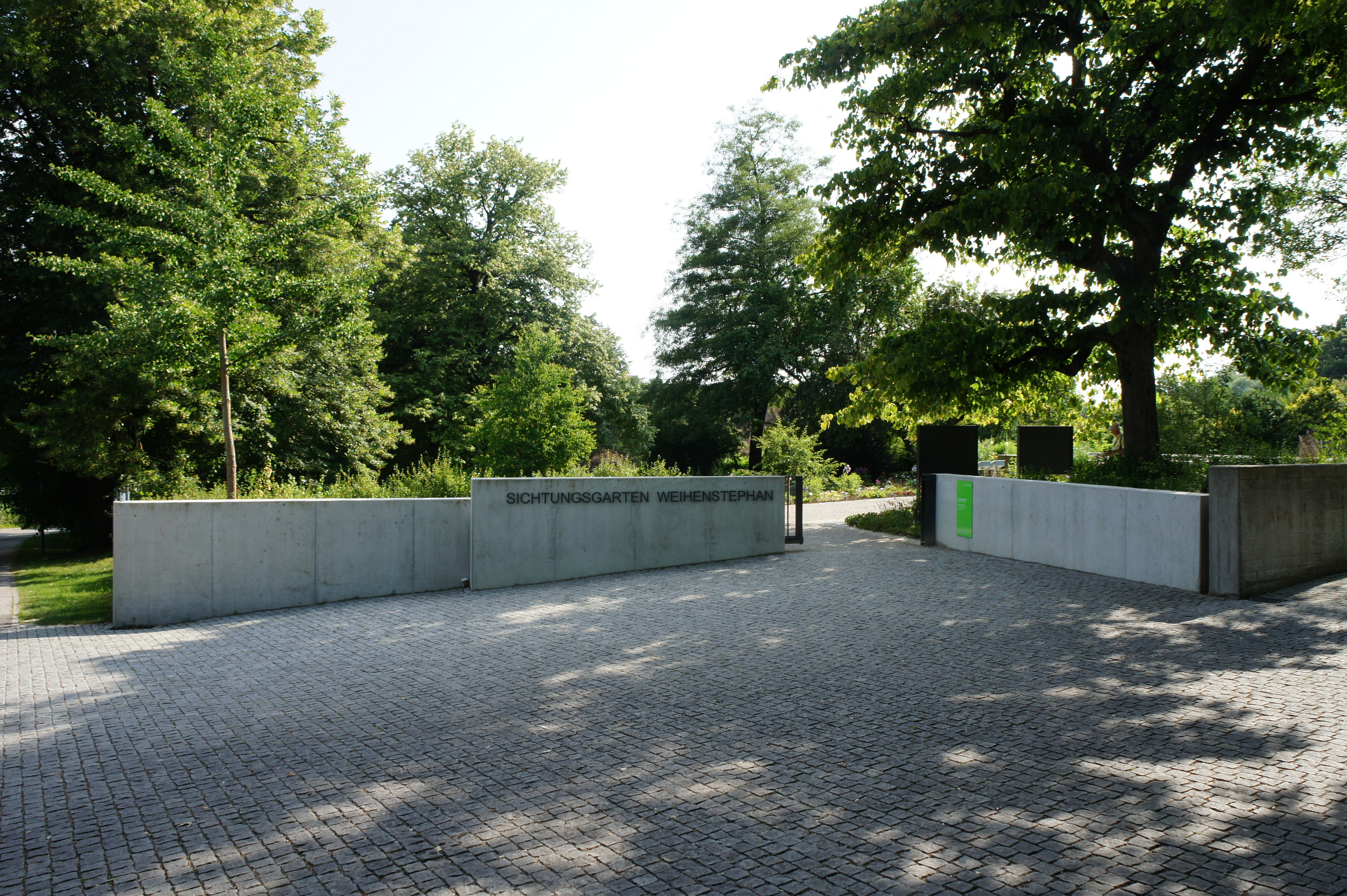 Sichtungsgarten der Universität Weihenstephan in Freising